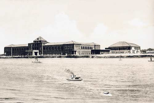 Old Kaohsiung Government